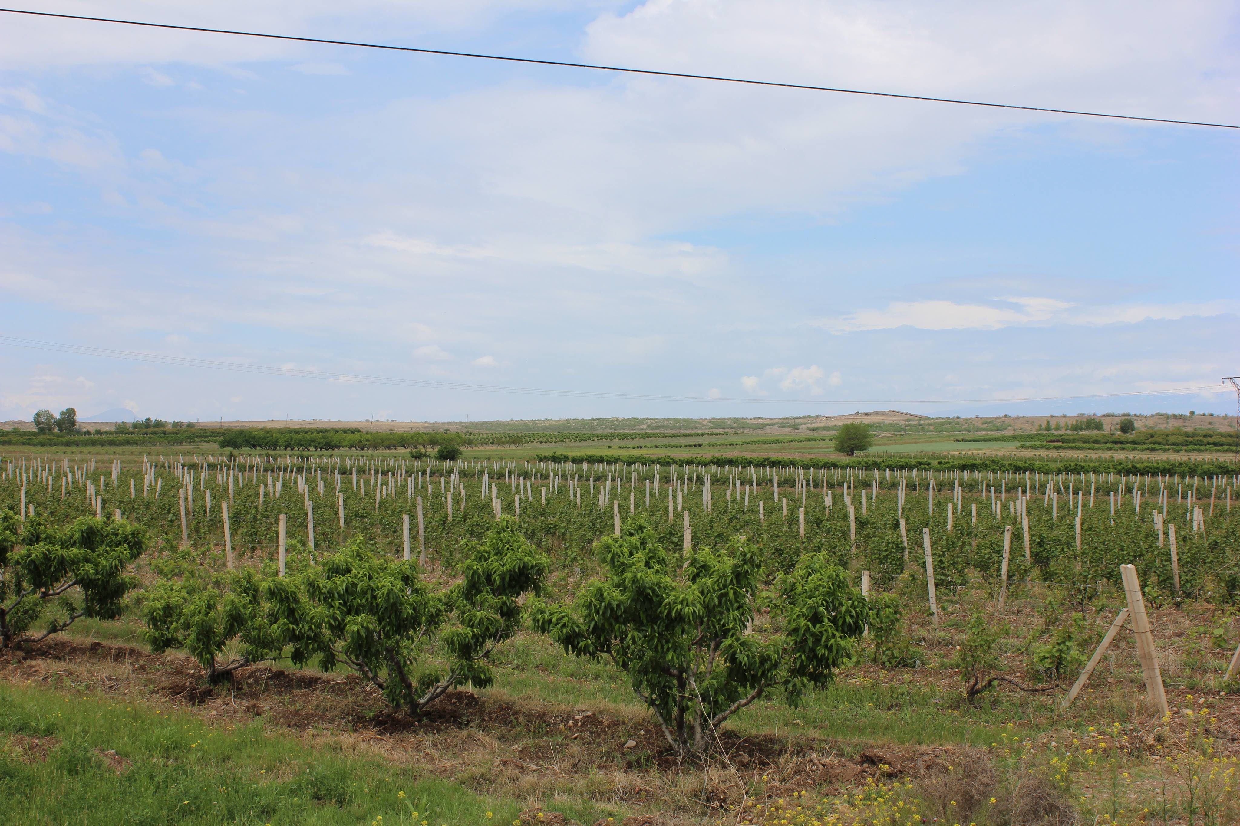 Հուշակերտի այգիները